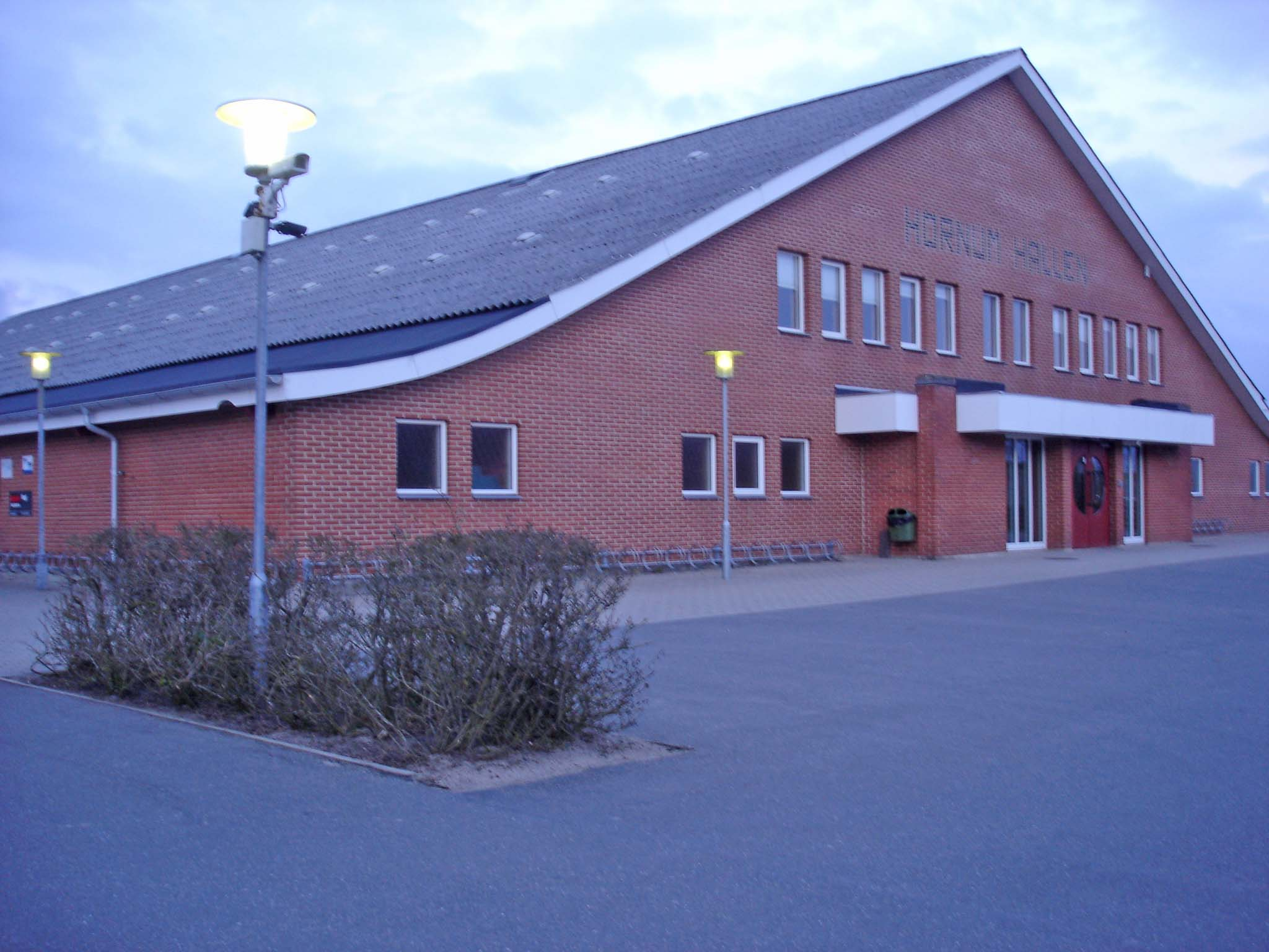 Hornum Hallen